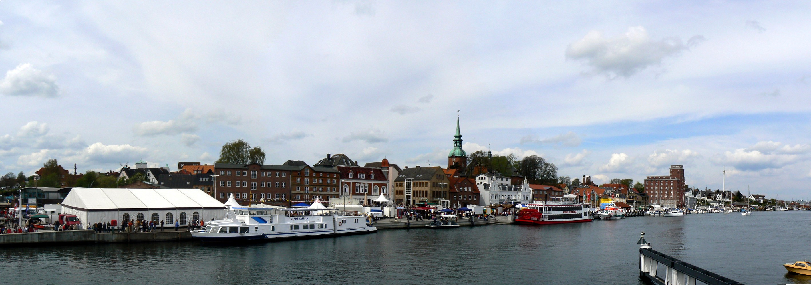 Bunte Hafenmeile bei den Heringstagen Kappeln 2008. Blick von der Aussichtsplattform auf der Klappbrücke. Panoramabild aus 3 Einzelfotos zusammengefügt.